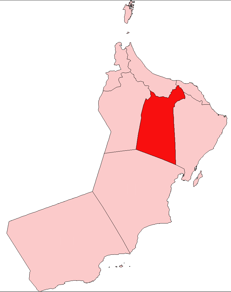 Map of ad-Dakhiliya region, Oman